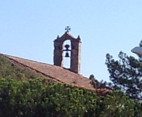 Espadanya de l'ermita de sant Sebastià, data del 1570, a Vilassar de Dalt, comarca del Maresme, Catalunya Espadanya: Coronament superior de la façana d'una església amb un buit on són col·locades les campanes.